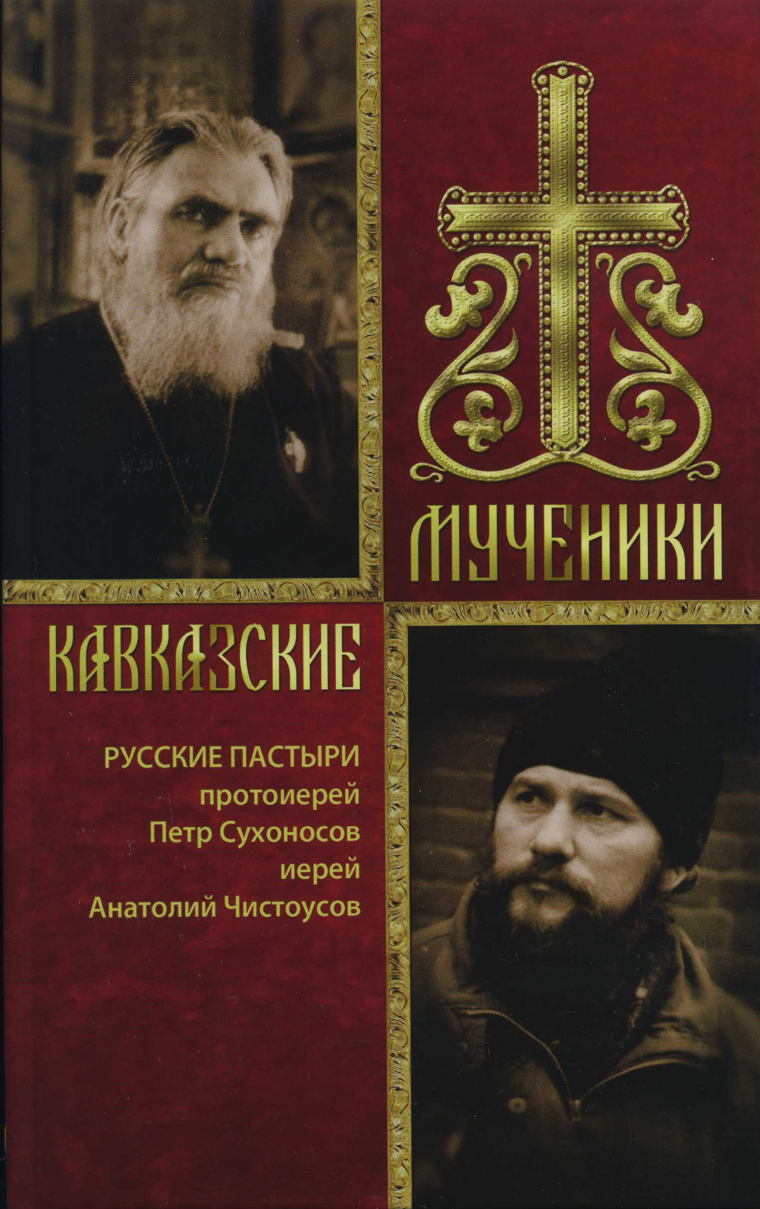 Обложка вышедшей книги